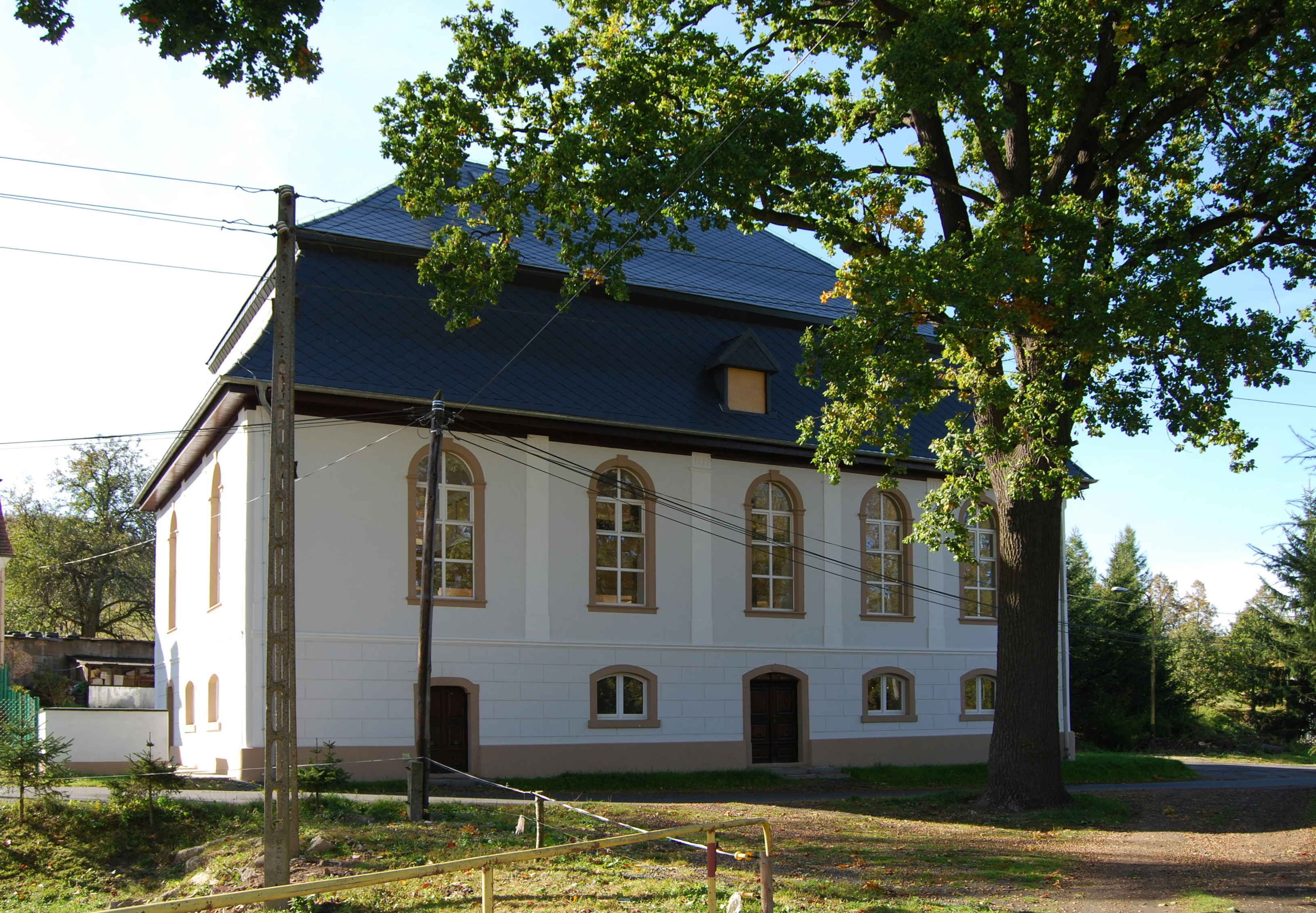 Były kościół ewangelicki w Kromnowie, gmina Stara Kamienica, pow. jeleniogórski